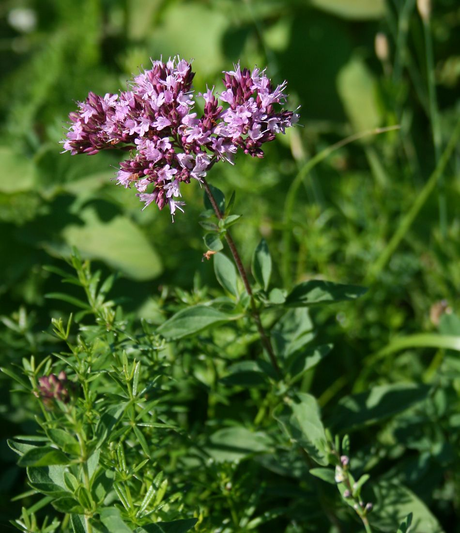 Echter Dost (Origanum vulgare), Lippenblütler (Lamiaceae) - Österreich/Austria/Autriche: Niederösterreich, Alpenostrand, Südostfuß des Pfaffstättner Kogels NW Pfaffstätten, ca. 350 m s.m.